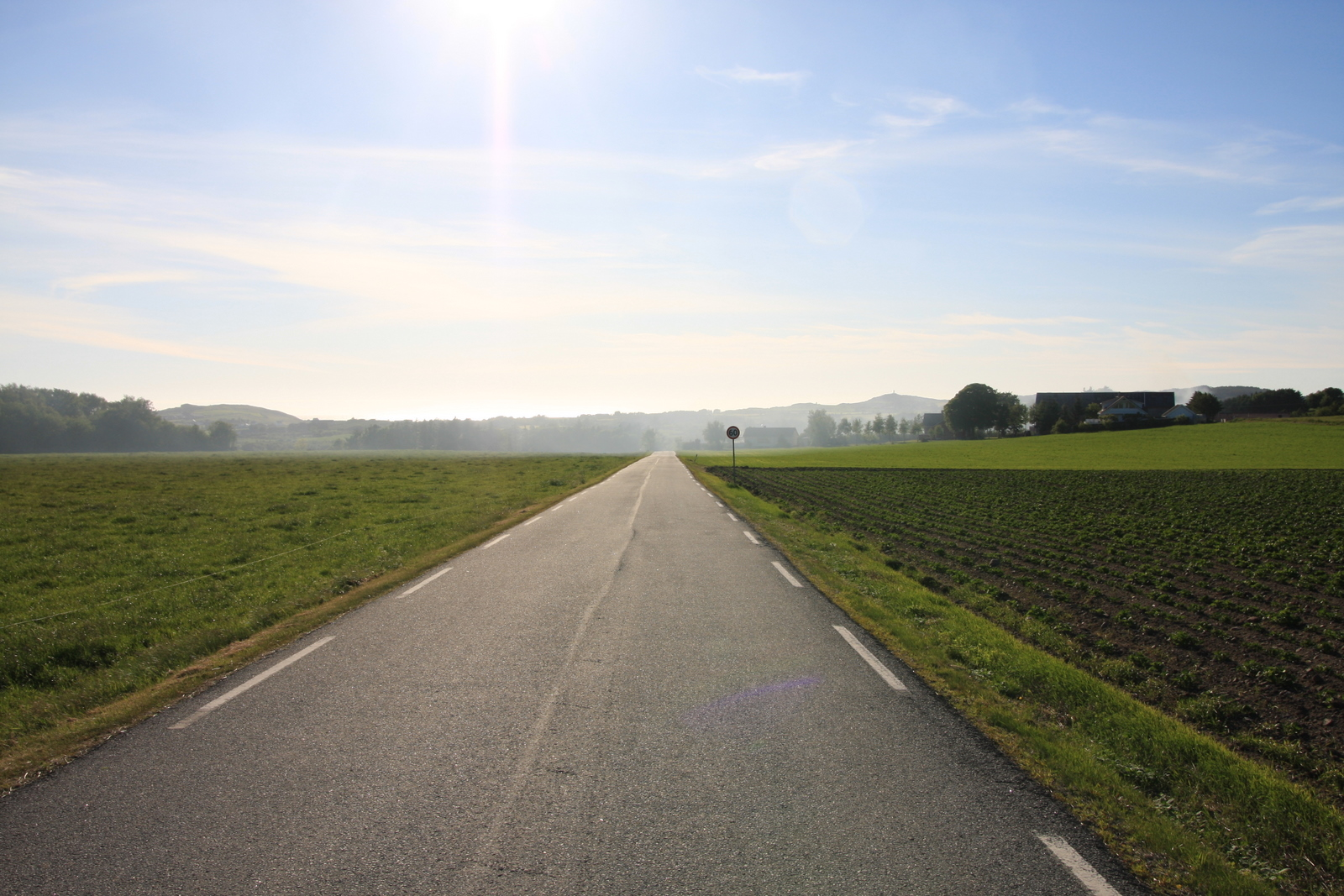 Fylkesvei 319 Jutlandsveien